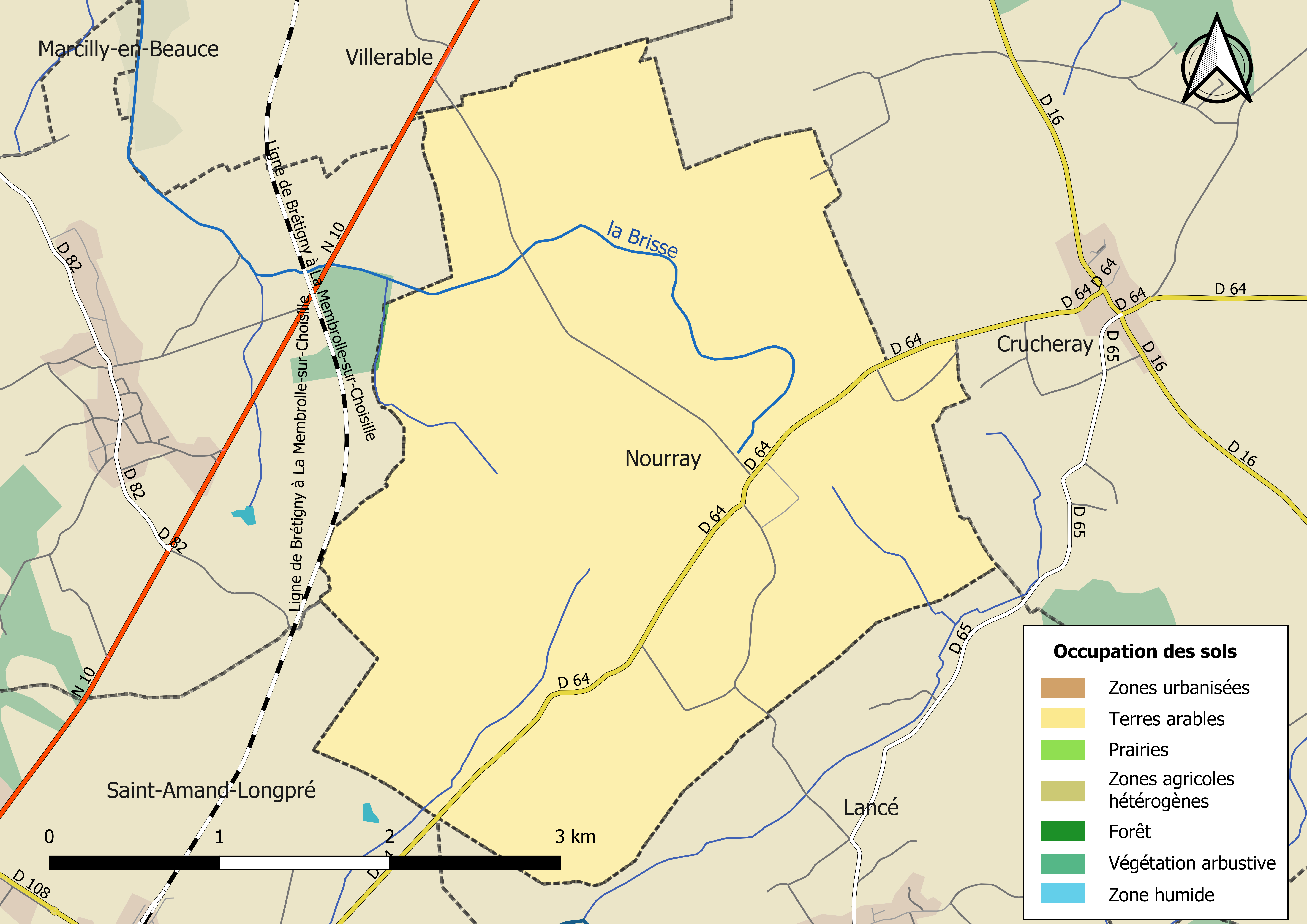 Carte des infrastructures et de l’occupation des sols en 2018 de la commune de Nourray (France).